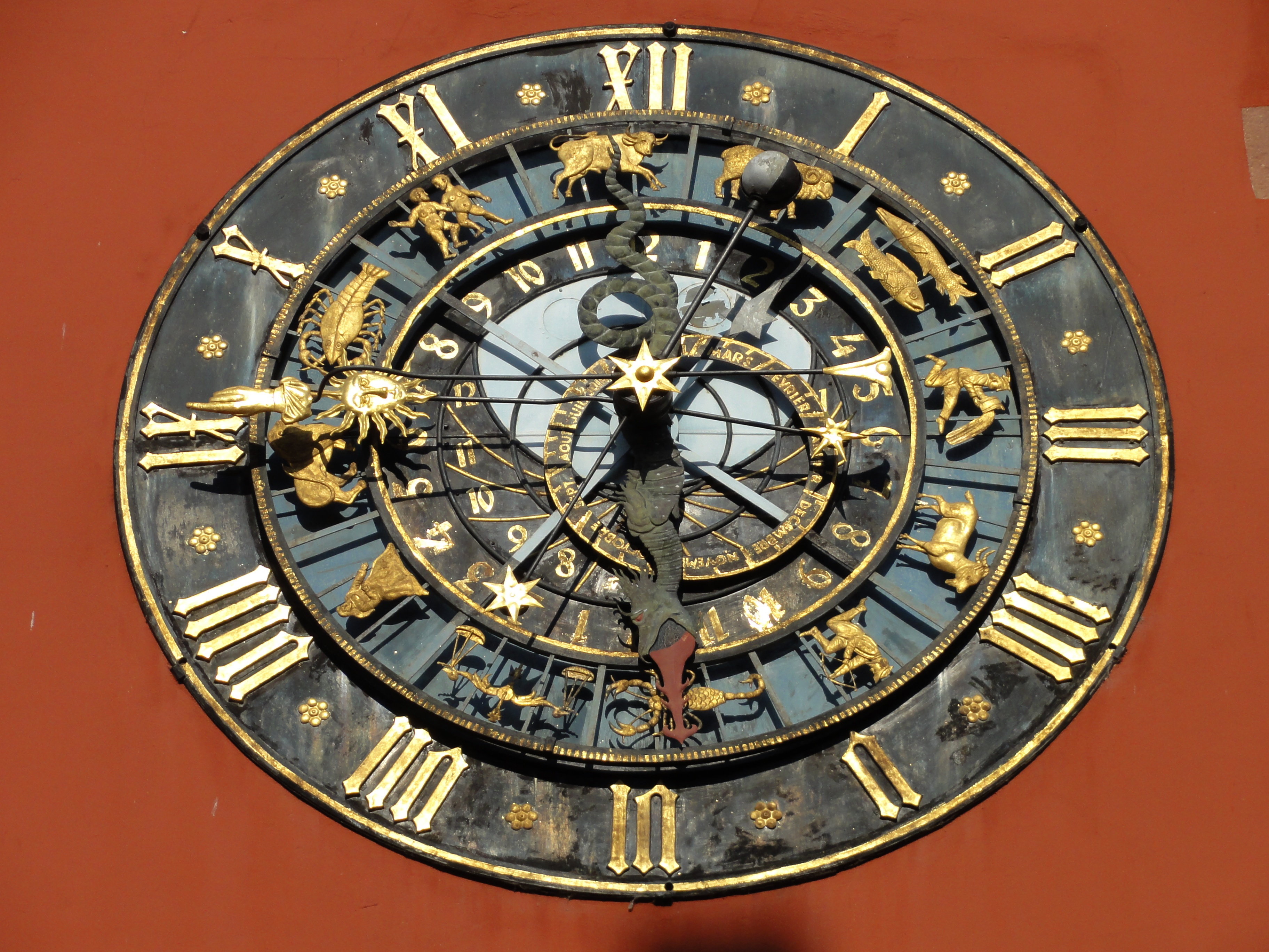 Alsace, Bas-Rhin, Haguenau, Ancienne Chancellerie (1484), puis Musée alsacien, place Joseph Thierry: Horloge d'édifice (horloge à astrolabe, horloge astronomique) (1904)